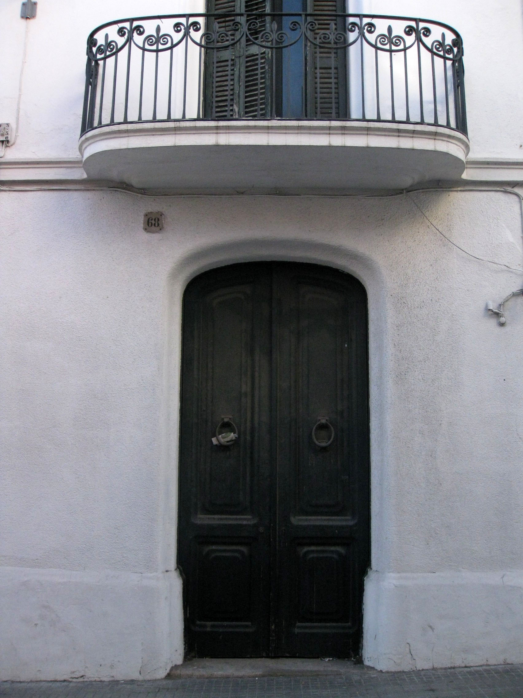 Casa Ramon Matalonga, al carrer de Topete núm. 68 (Terrassa). Edifici de Lluís Muncunill, del 1914. Detall de la porta d'entrada.